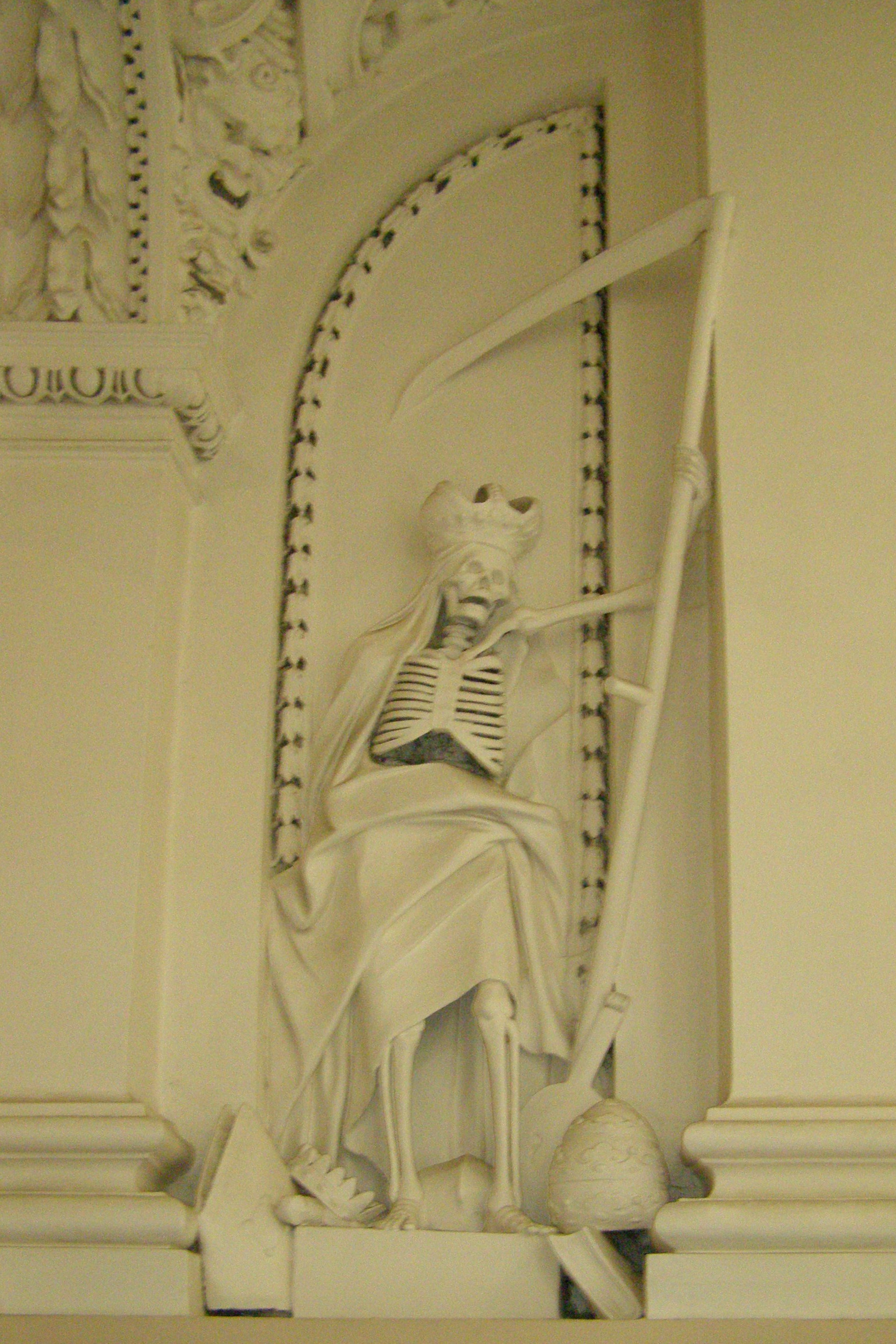 Personifikacja śmierci w kościele św. Piotra i Pawła na Antokolu w Wilnie